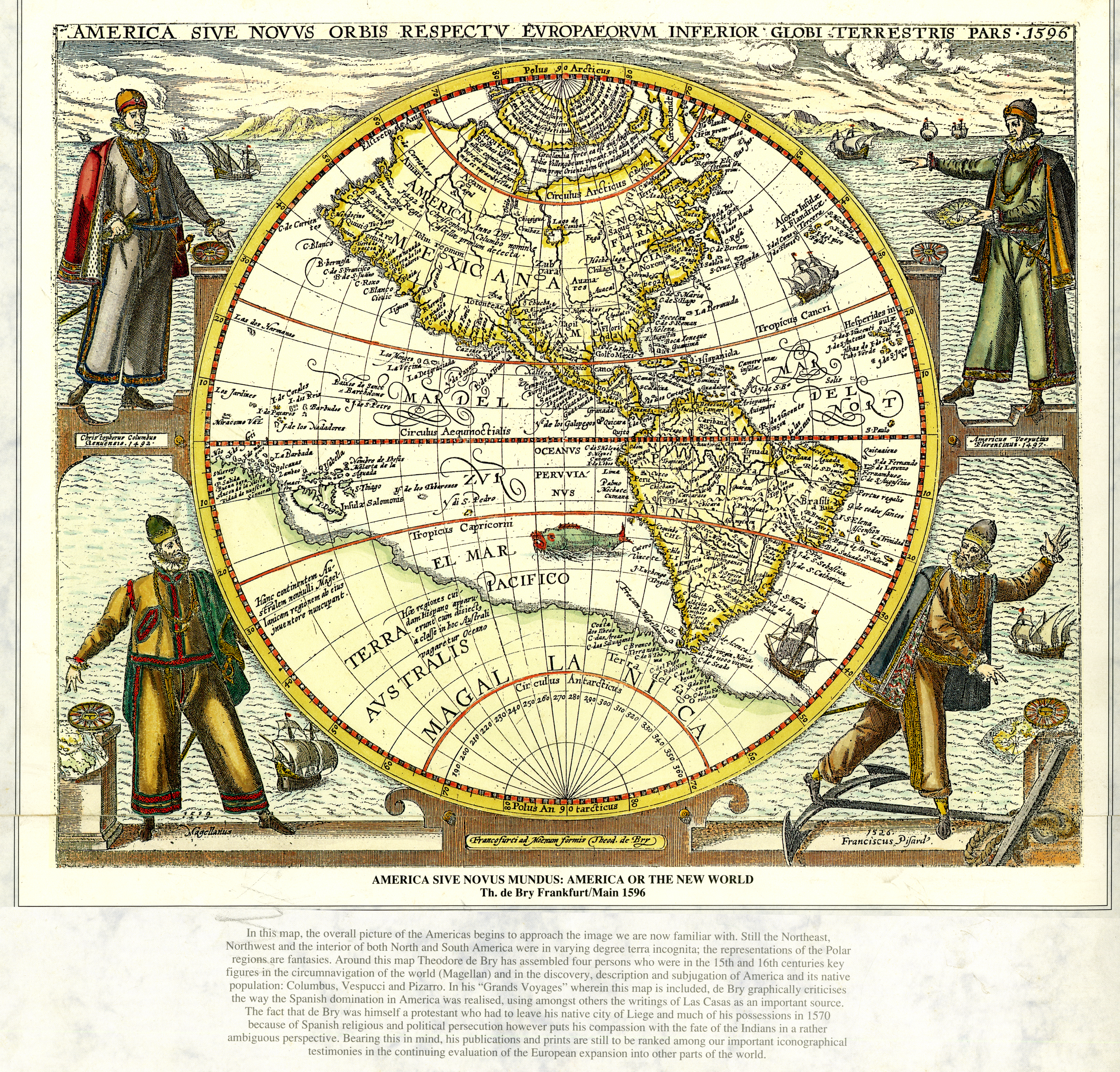 Diapositiva de acceso público consultada del ejemplar original que se custodia en los Fondos Bibliográficos y Cartográfico (Sección: Historia de América Latina) del Archivo Histórico del Guayas (AHG) - Guayaquil, Ecuador.